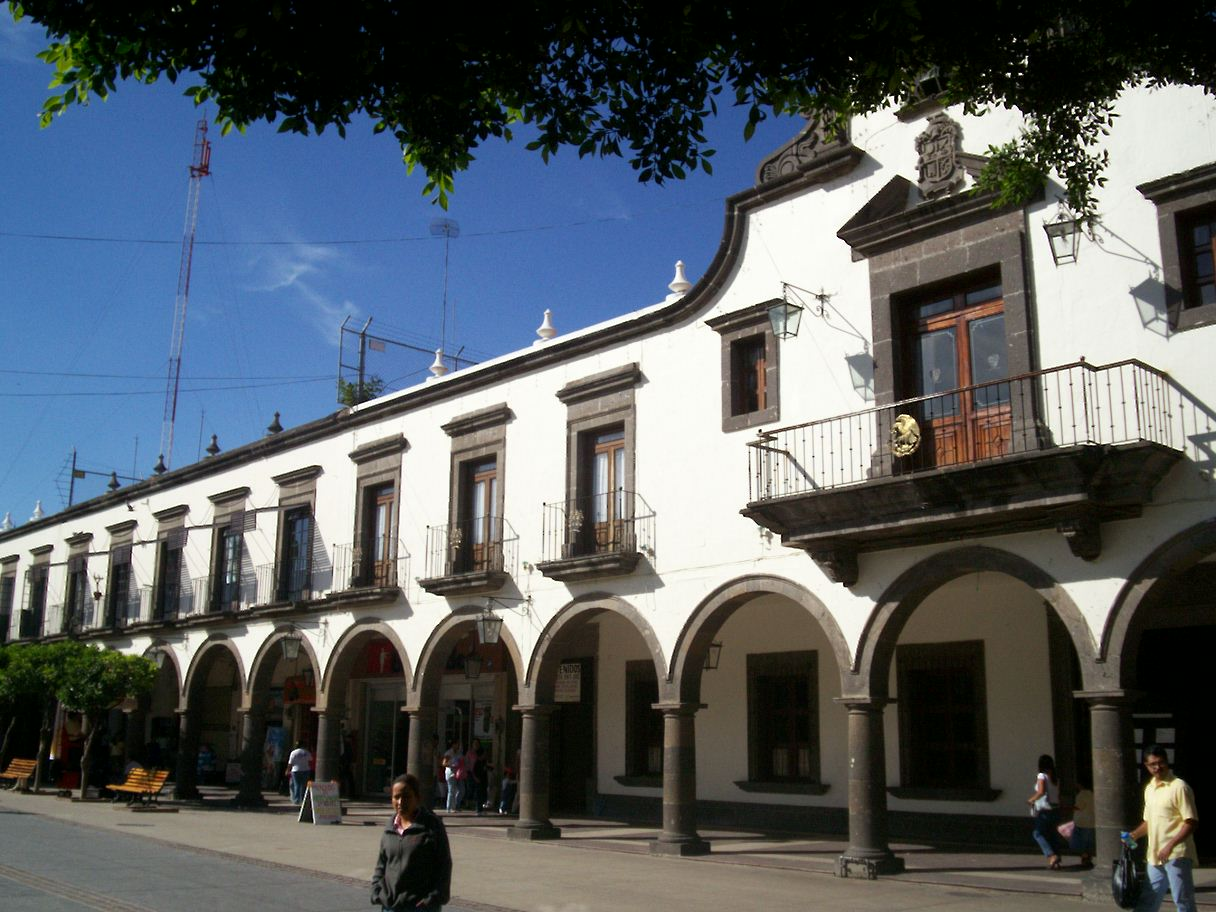 Tlaquepaque. City Hall.